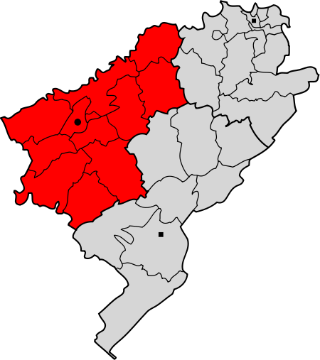 Lageplan des Arrondissements Besançon im Département Doubs.